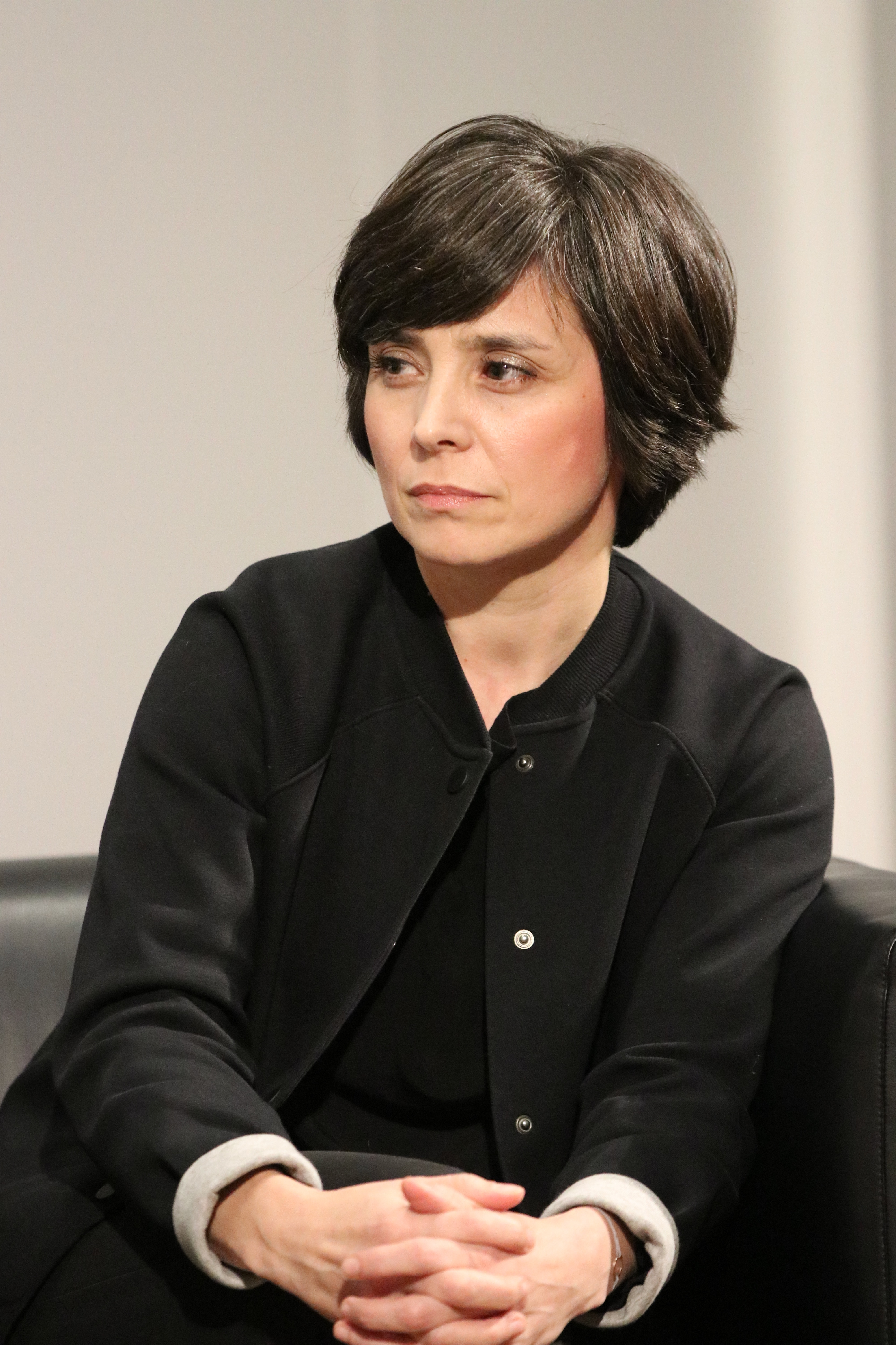 Die Journalistin Özlem Topçu bei einer Podiumsdiskussion der Münchner Monacensia im Rahmenprogramm der Ausstellung zu Erika Mann: "Anstand, Freiheit, Toleranz - Öffentliche Debatte über die Ideale der Demokratie"